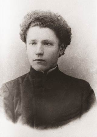 Я.Маўр – семінарыст Панявежскай настаўніцкай семінарыі (партрэт)